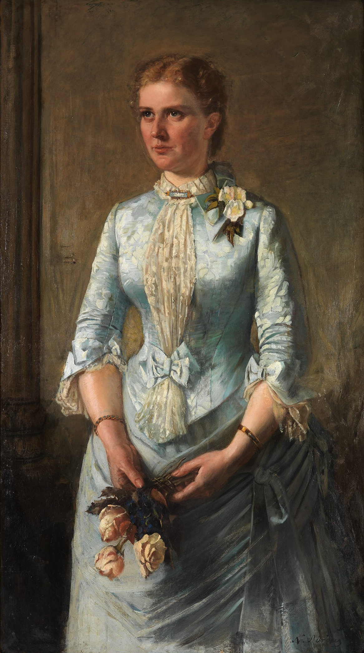 Βασίλισσα ΄Ολγα 1867, ενυπόγραφη ελαιογραφία, 124 Χ 71 εκ.